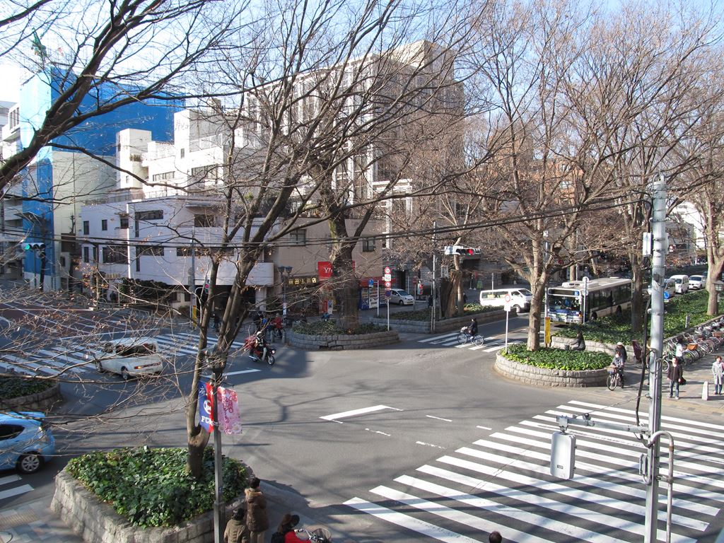 寿町一丁目交差点。国道20号。市道けやき並木通り。東京都府中市。